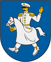 De hoofdpersoon van het Shiva-festival wordt afgebeeld in het wapen van Gražiškiai.